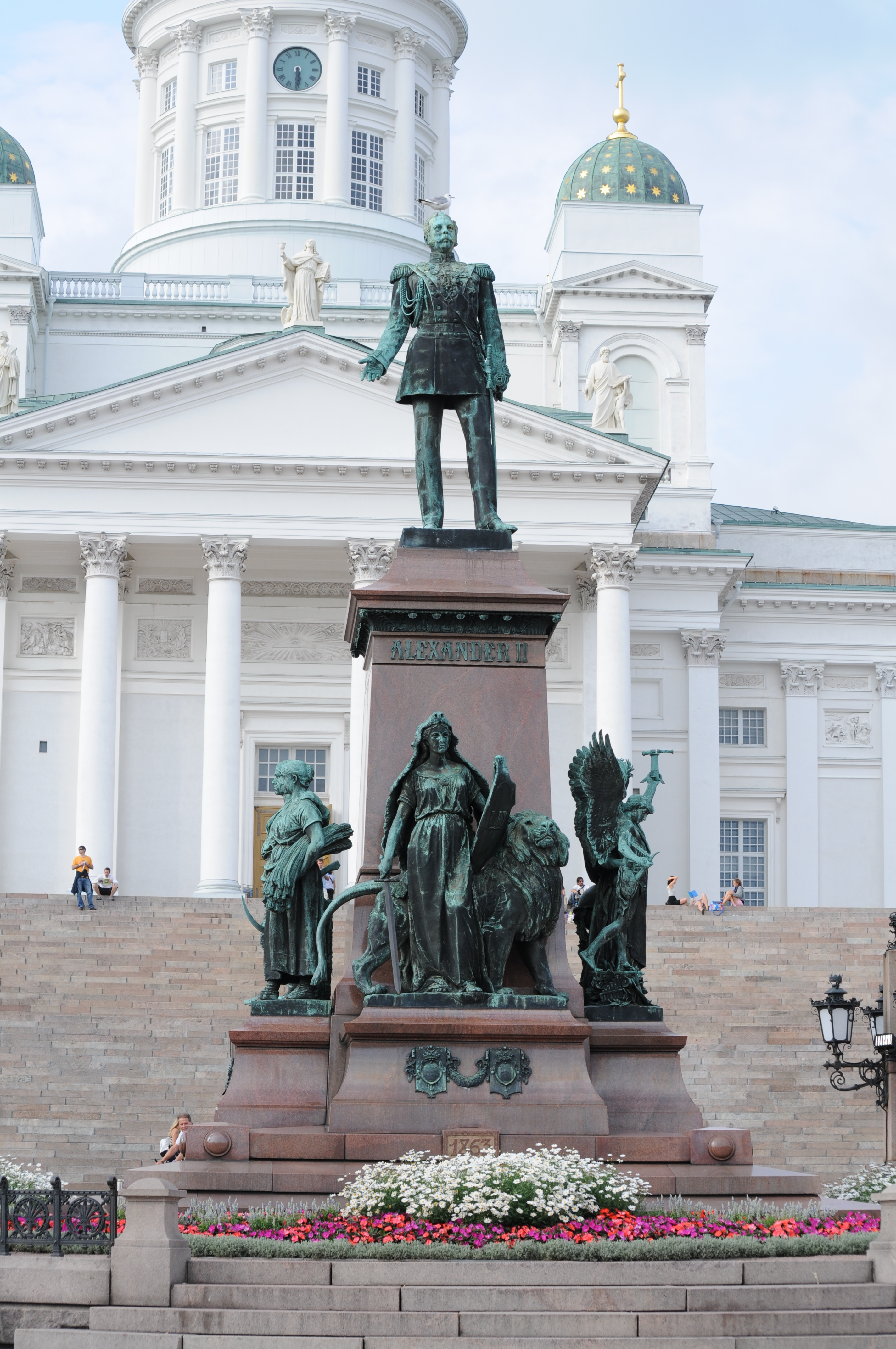 Helsinki